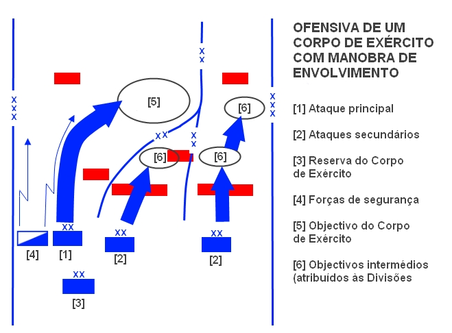 Forma de manobra ofensiva - Envolvimento